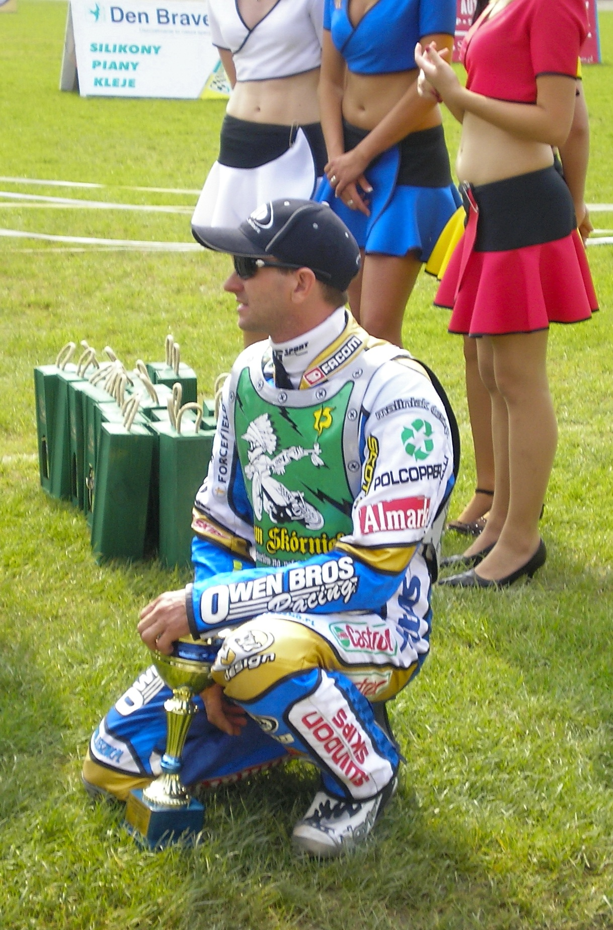 Leigh Adams w Poznaniu na turnieju z okazji 15-lecia startów Adama Skórnickiego